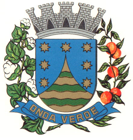 Brasão da cidade de Onda Verde, SP